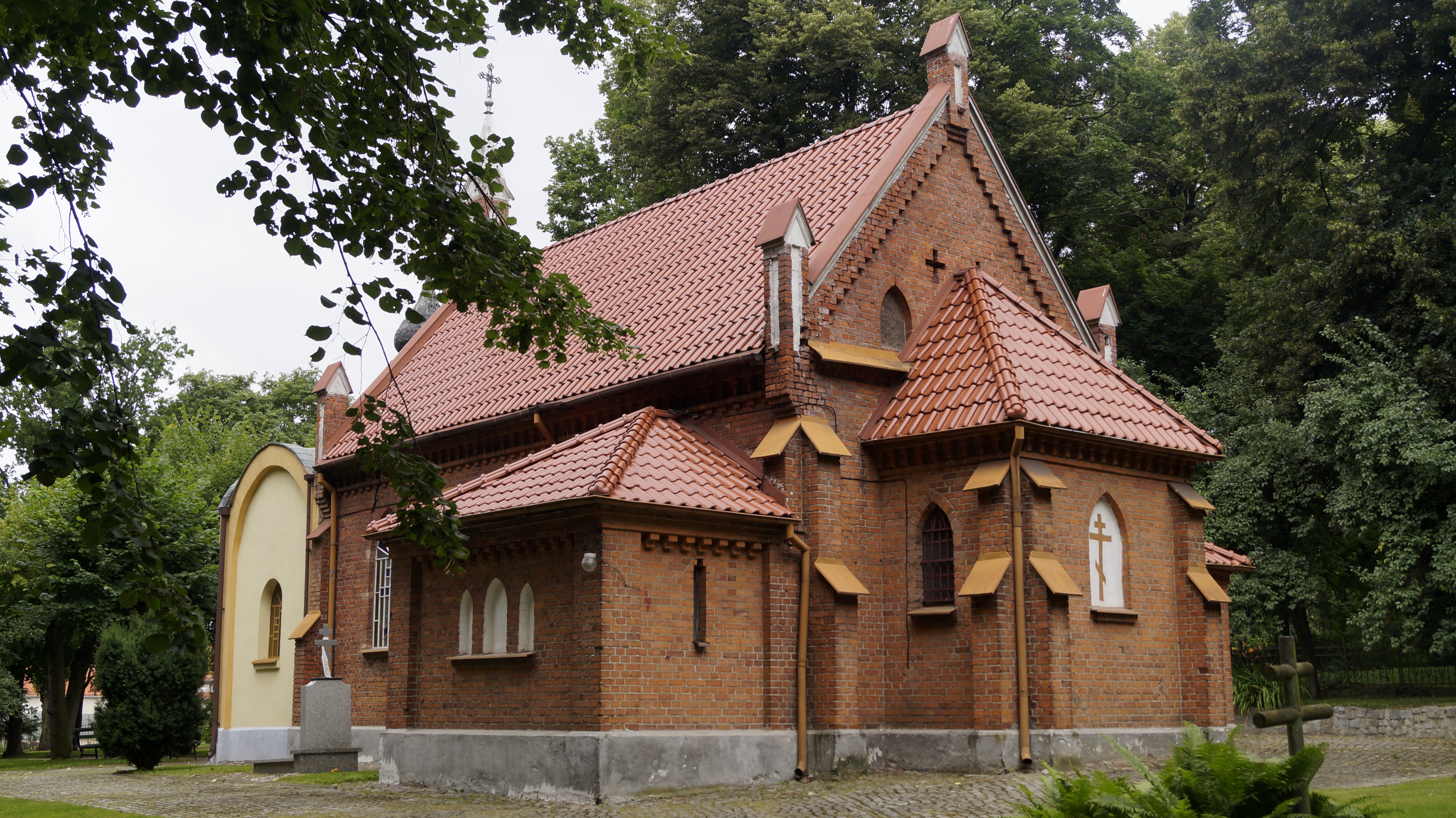 Elbląg, kaplica, ob. cerkiew prawosławna p.w. św. Marii Magdaleny, 1910, 1925, po 1987